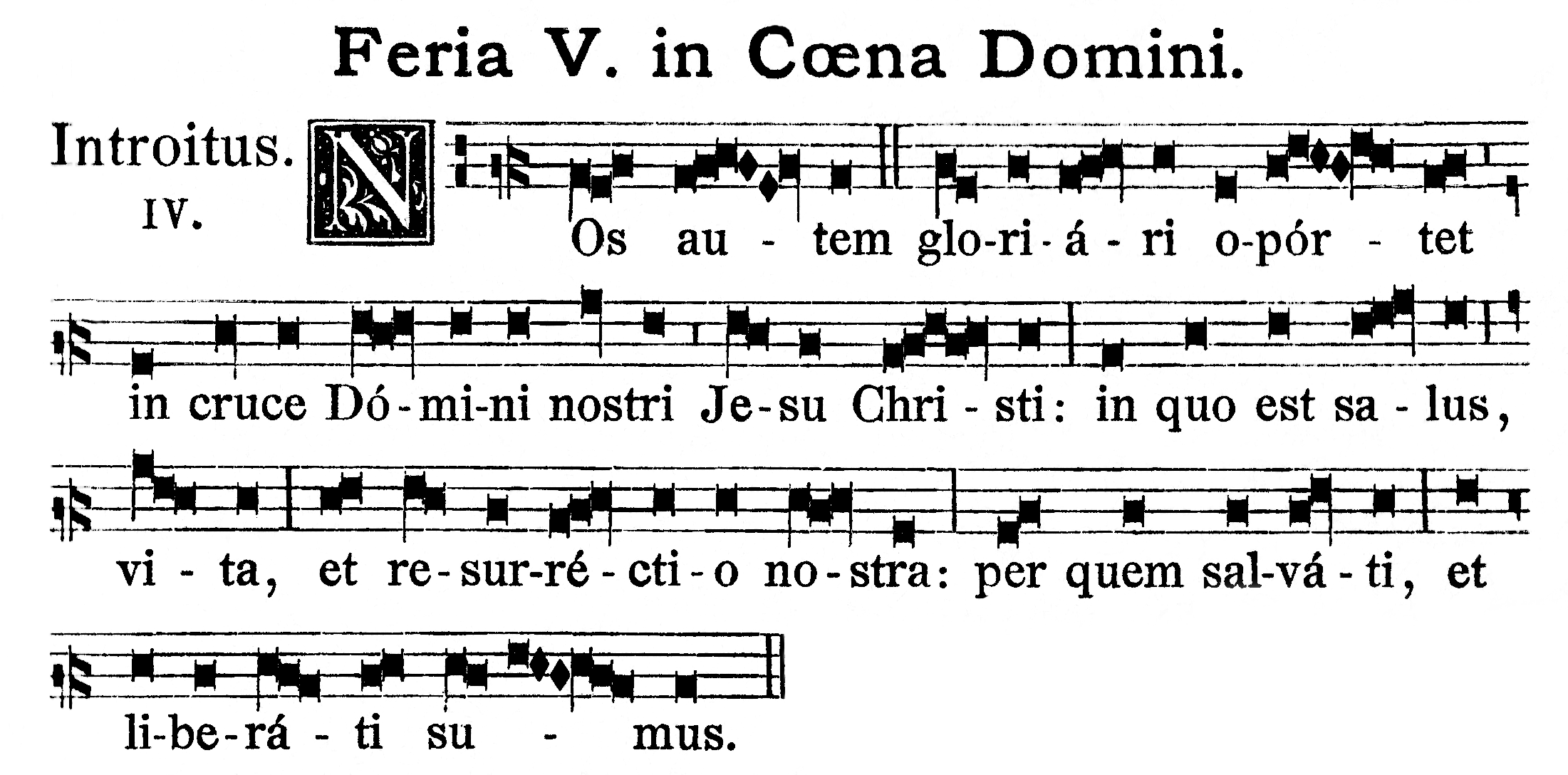 Der Introitus "Nos autem" in der Editio Medicaea, Verlag Pustet, Regensburg, 1890